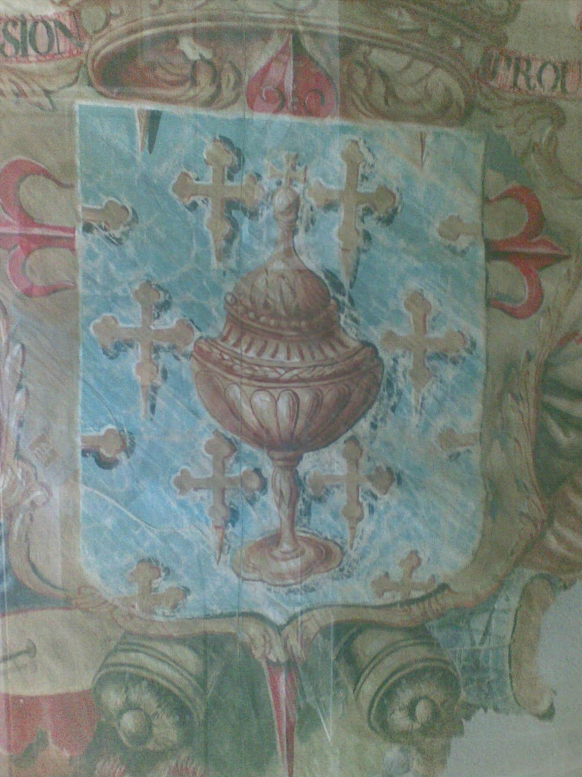 Bandeira do Rexemento de Alarma do Reino de Galicia. 1808.